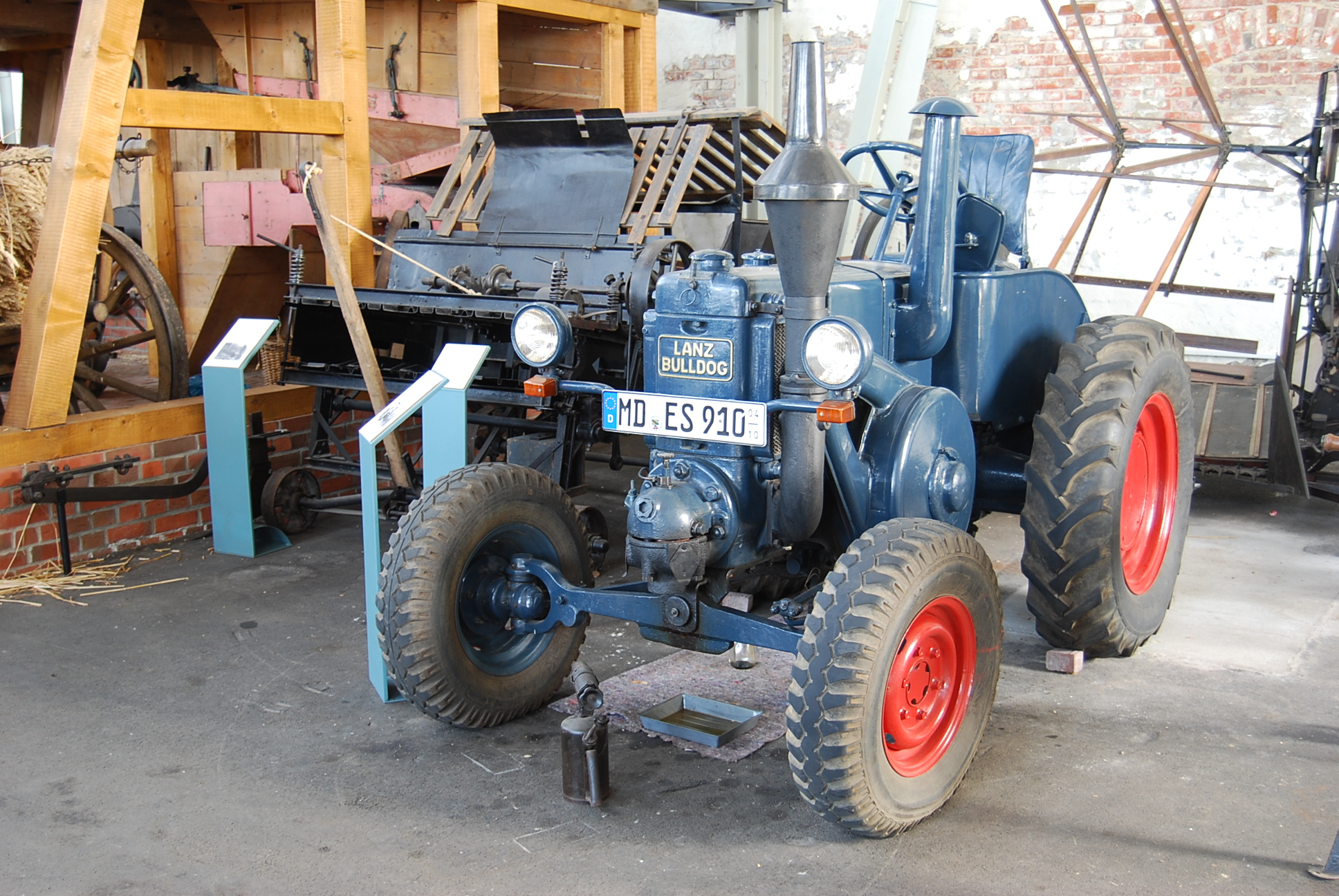 Lanz-Bulldog